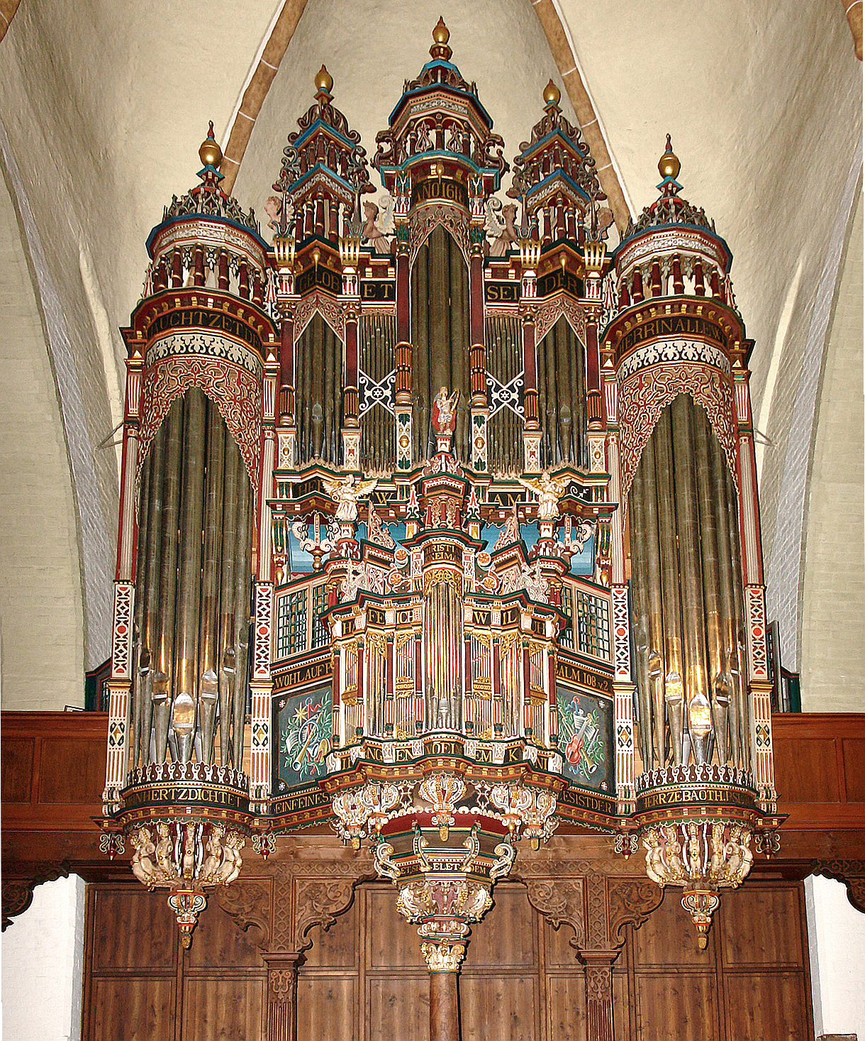 St.Martini-Kirche in Bremen. Orgelprospekt von 1619